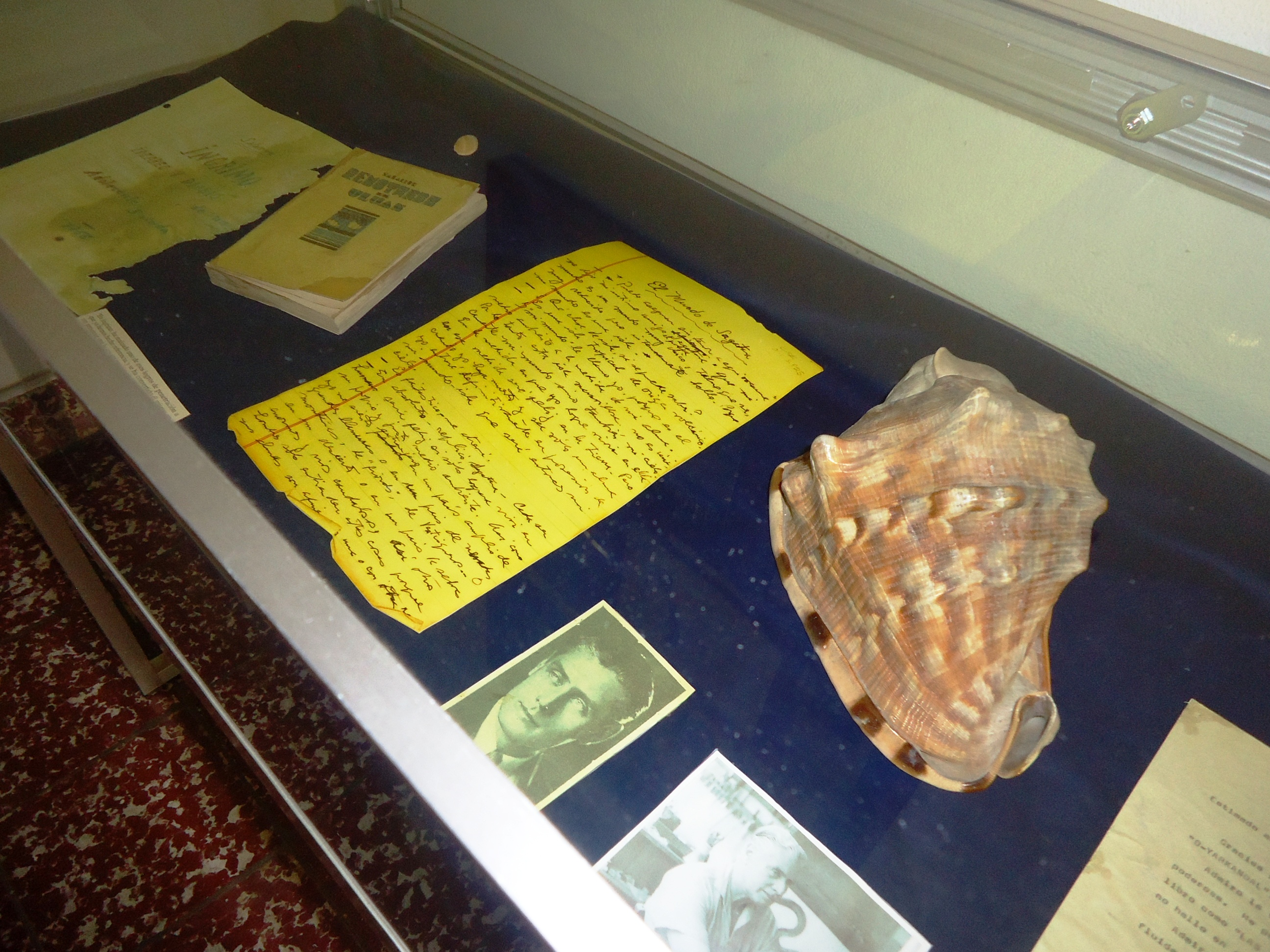 Trabajo del escritor salarrué